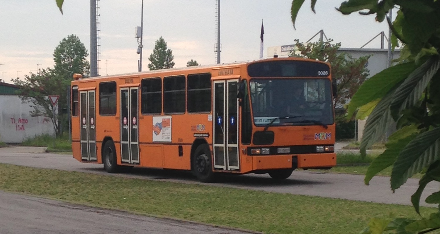 Autobus Inbus U240FT Siccar 178LU De Simon matricola 3026di MOM-Mobilità di Marca (ex rete ACTT). Servizio urbano della città di Treviso, Linea 9, navetta scolastica di supporto, direzione: Limitata Piazza Vittoria; per Treviso Stazione FS. Fuori servizio presso Preganziol, parcheggio antistante gli impianti sportivi.